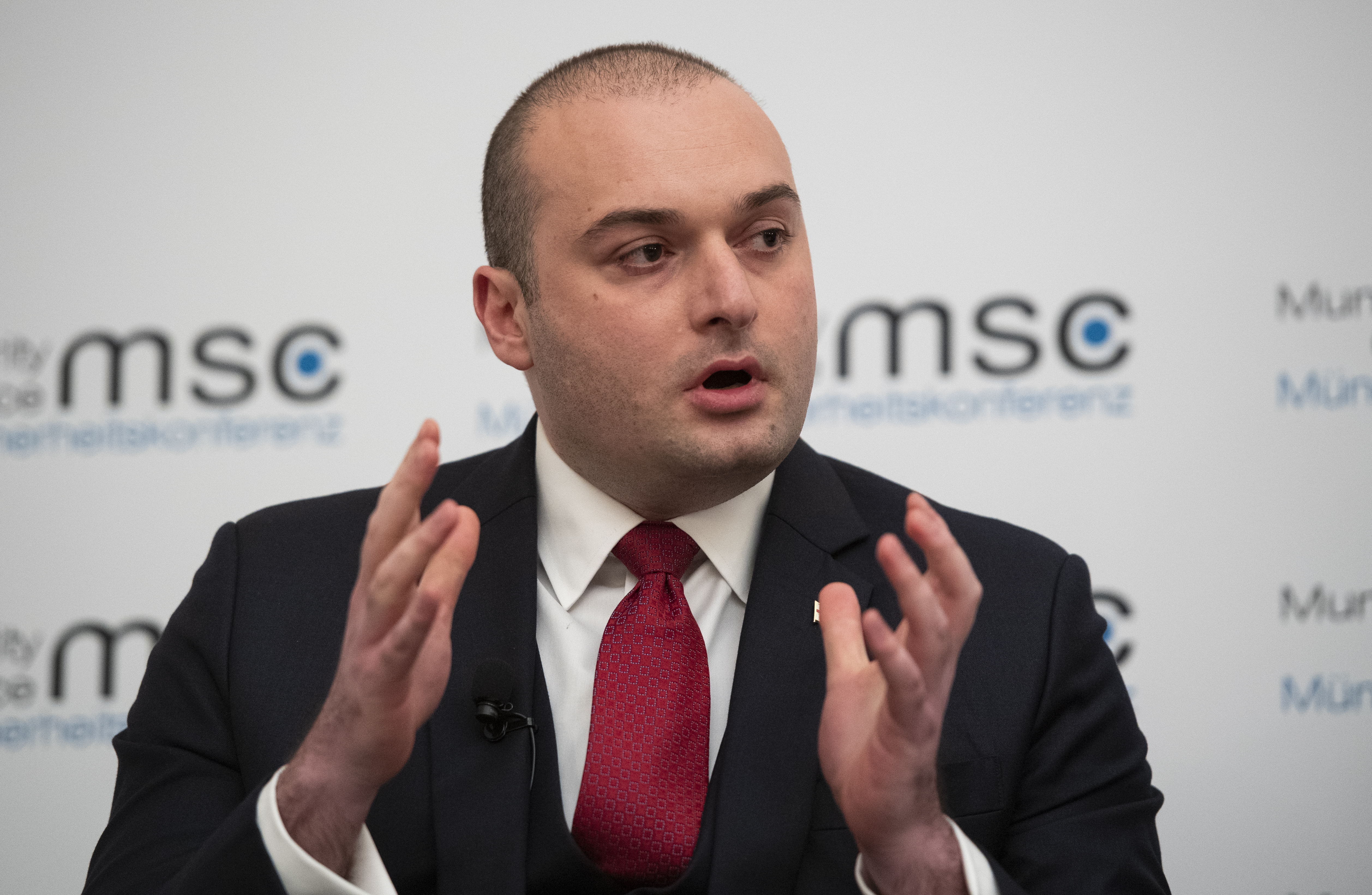 Mamuka Bakhtadze während der Münchener Sicherheitskonferenz 2019